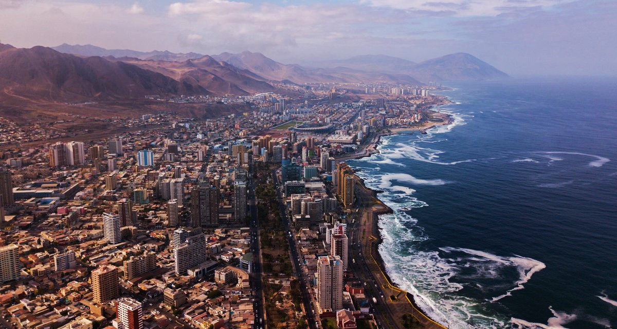 Vista hacia el sur de Antofagasta, Chile.